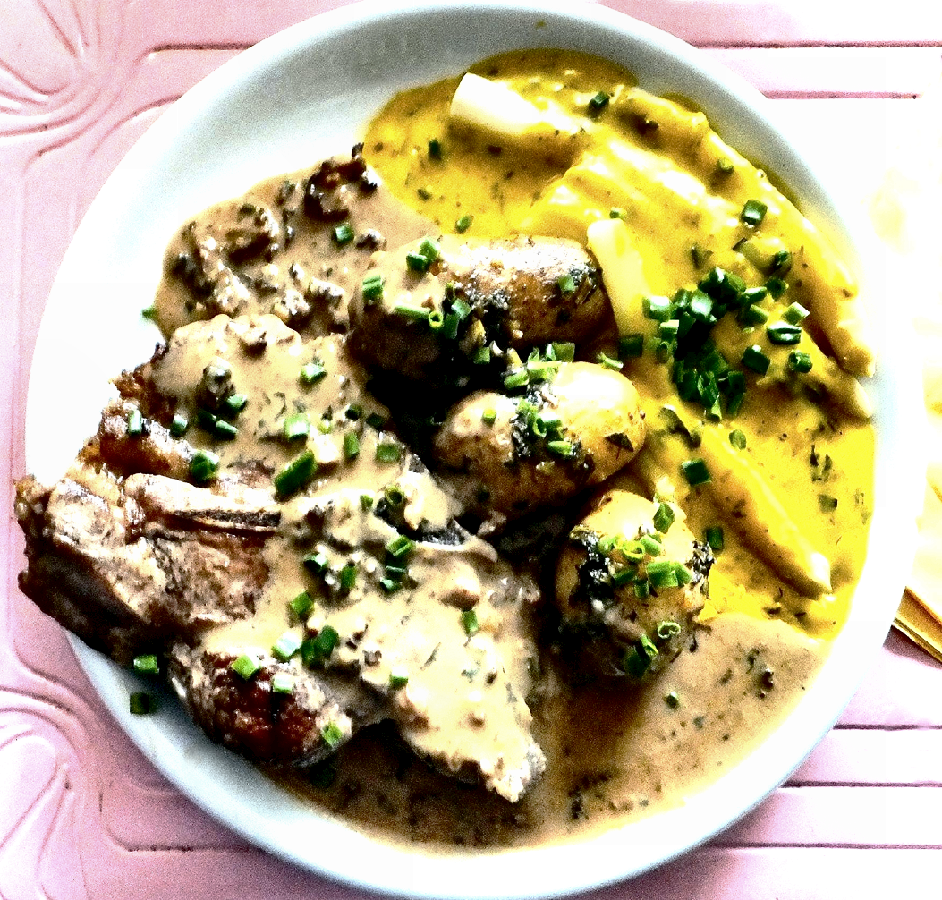 Kalbskotelett, Spargel und junge Kartoffeln mit Morchel- und Holländer-Sauce